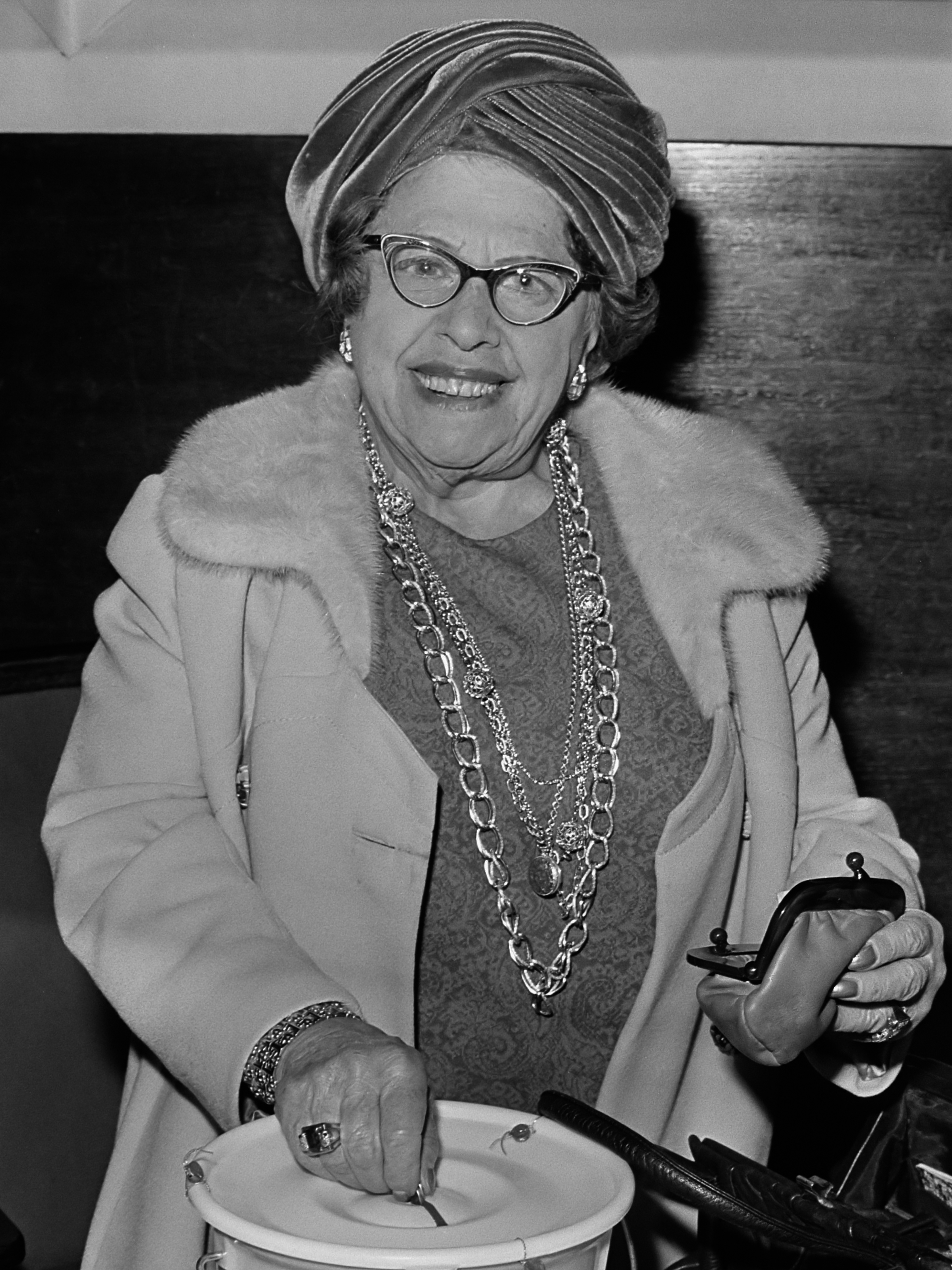 Actie Bisschop Bekkers nr. 13a : Heintje Davids